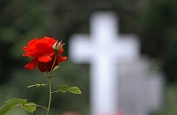 Frankfurter Hauptfriedhof Kreuzmotiv (Original text: Frankfurter Hauptfriedhof, Kreuzmotiv) Andere Versionen